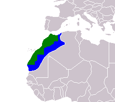 Idrisids Map (788-974)